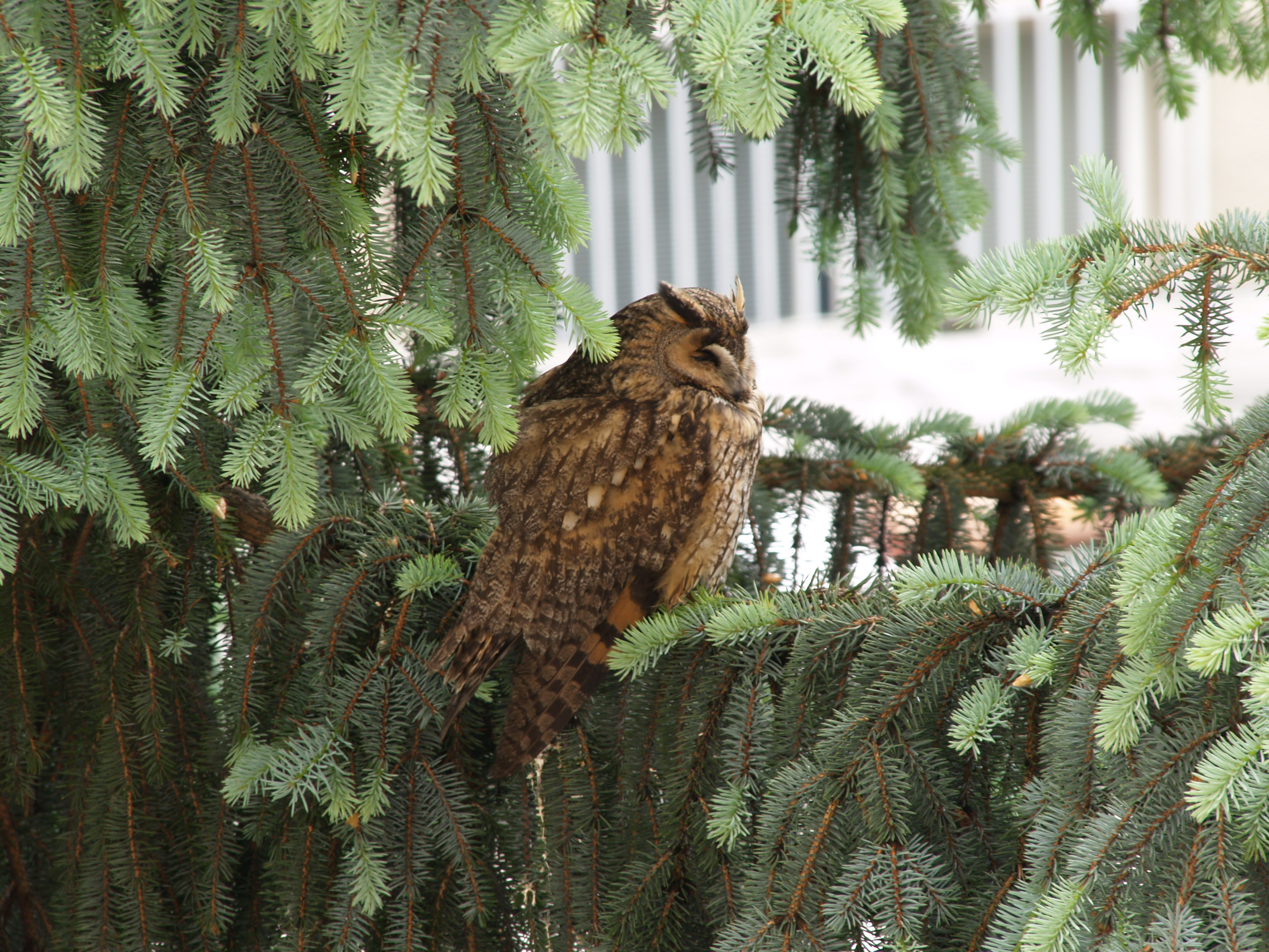 Stanovisko na vedlajsom strome